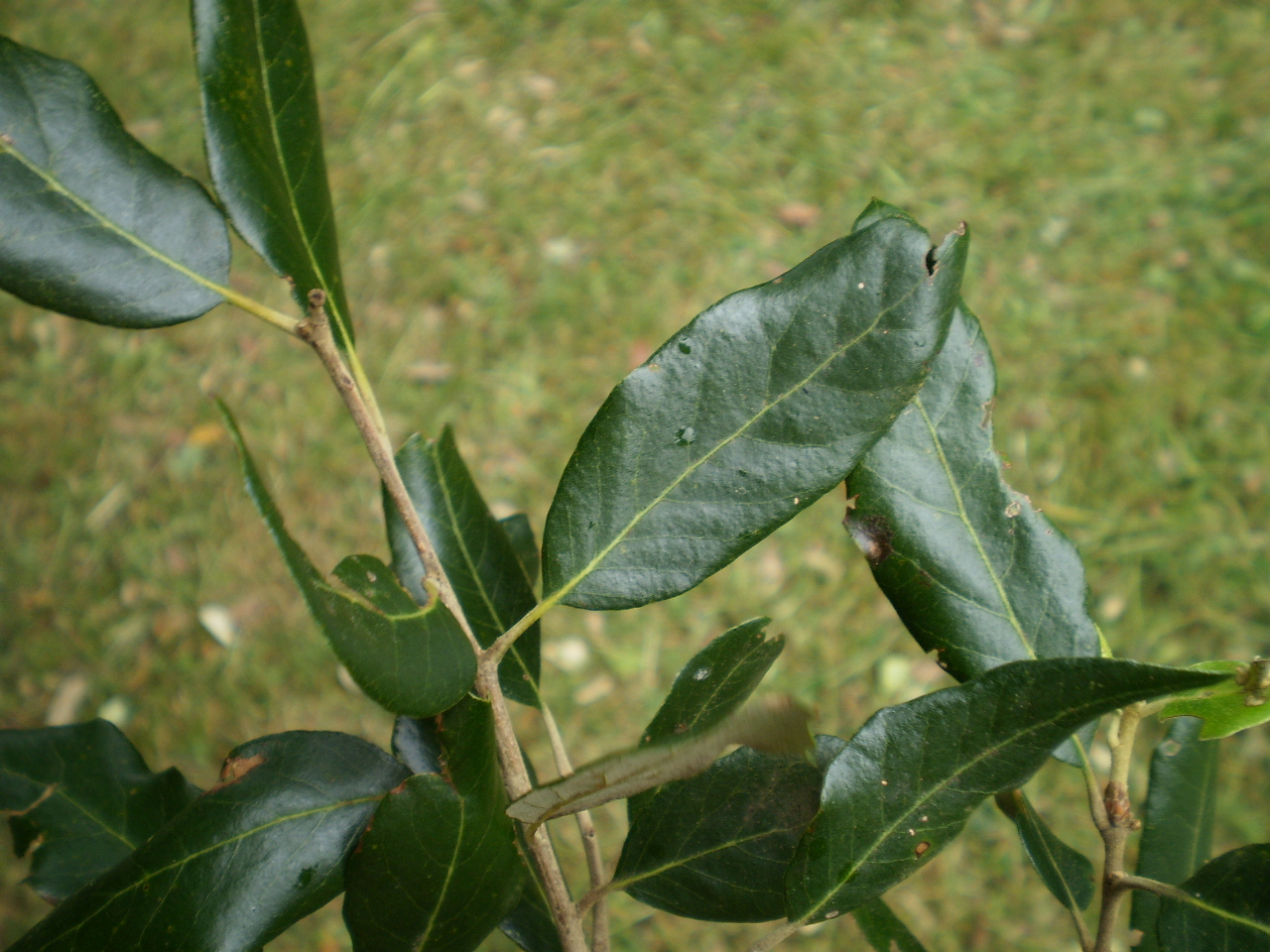 Hojas lauroides de encina, correspondientes a la subespecie ilex.